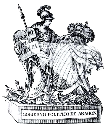 Xilografía emblemática alegórica del Gobierno Político de Aragón del Trienio Liberal (1820), en la que una mujer sostiene la Constitución Política que ilumina el escudo de los palos de gules con corona real cerrada.